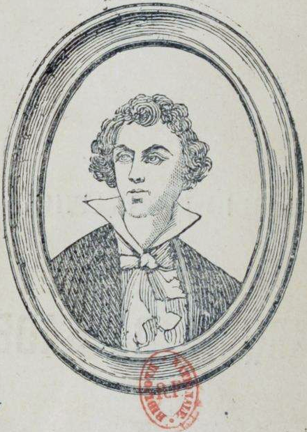 Le marquis de Sade par Jules Janin, 1834. Page 7 : Portrait du marquis de Sade. Collection de M. de la Porte.